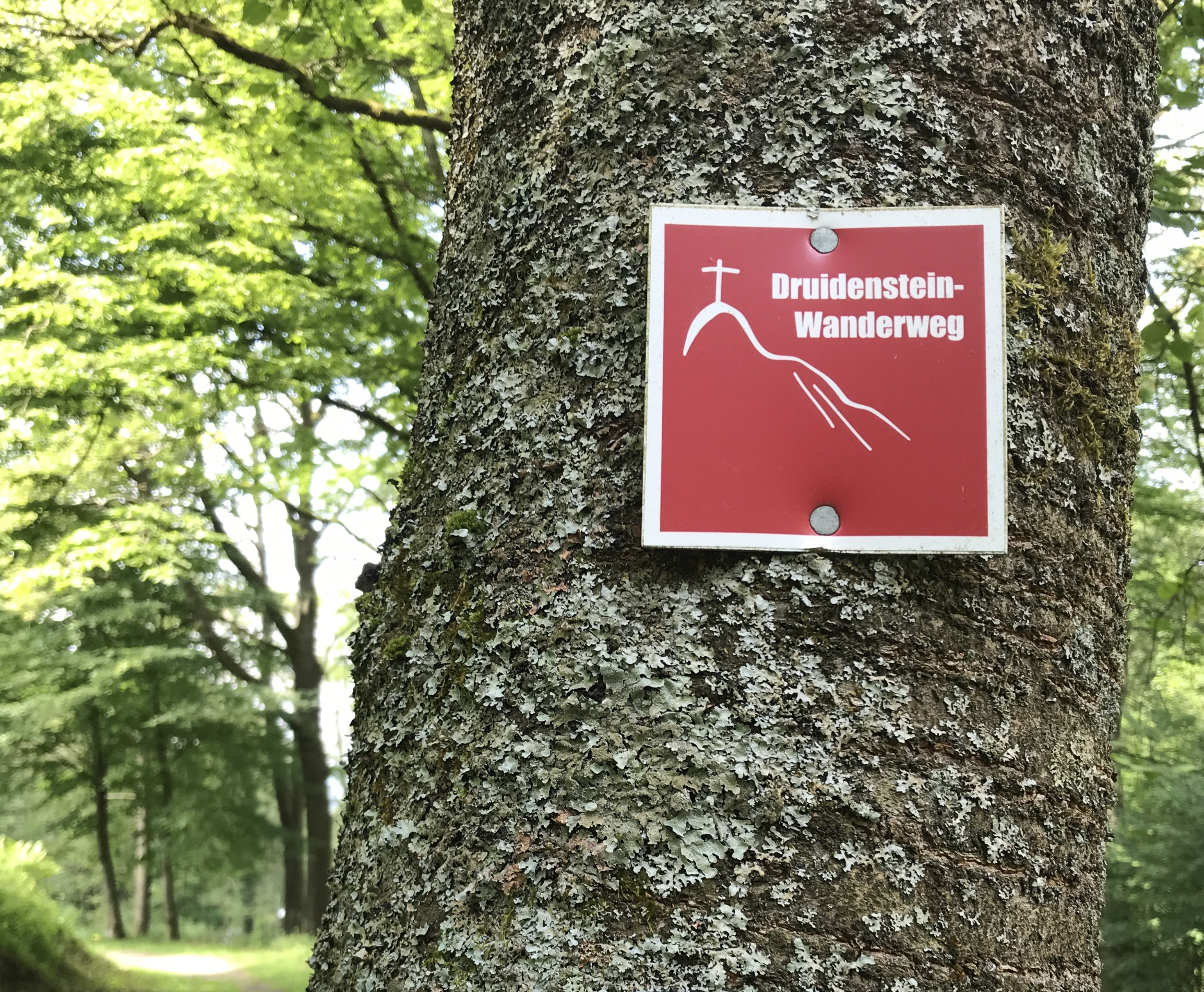 Druidenstein-Wanderweg, Schild im Wald